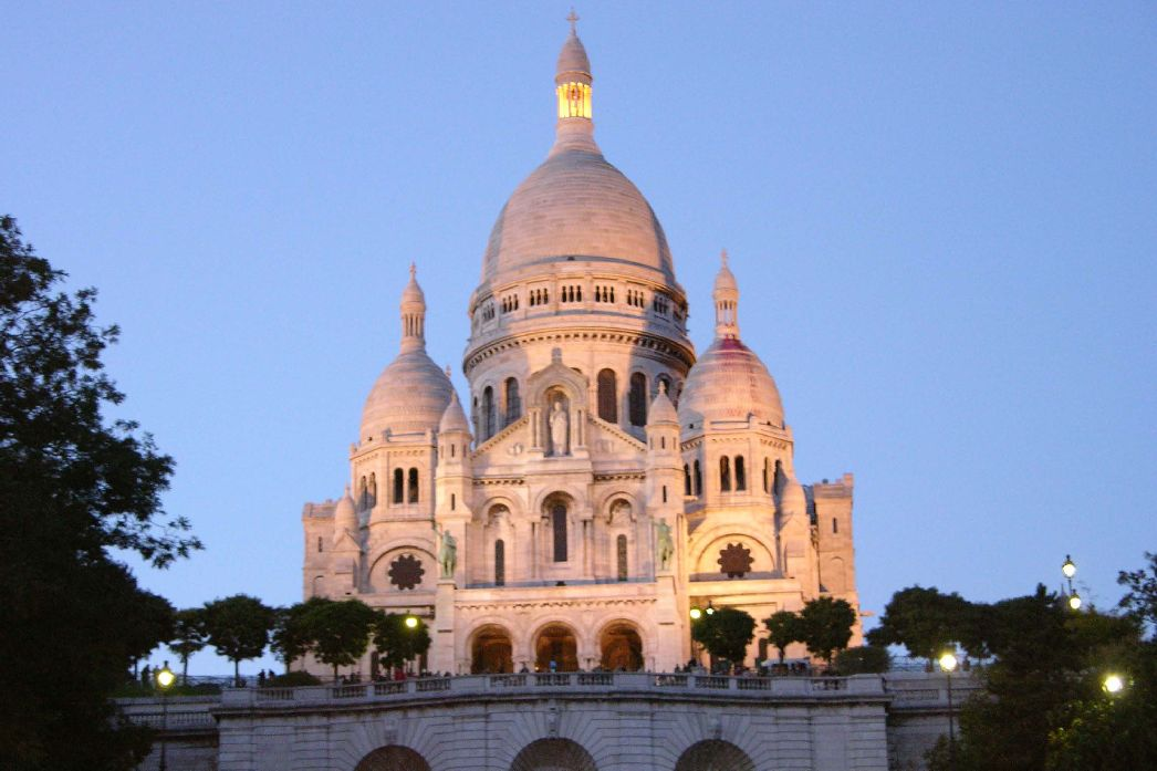 Sacré-Cœur de Montmartre (Paris) in der Abenddämmerung